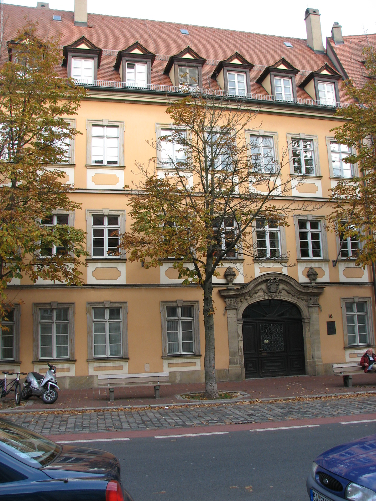 Otto Friedrich Egyetem rektori hivatala, Bamberg, Bajorország